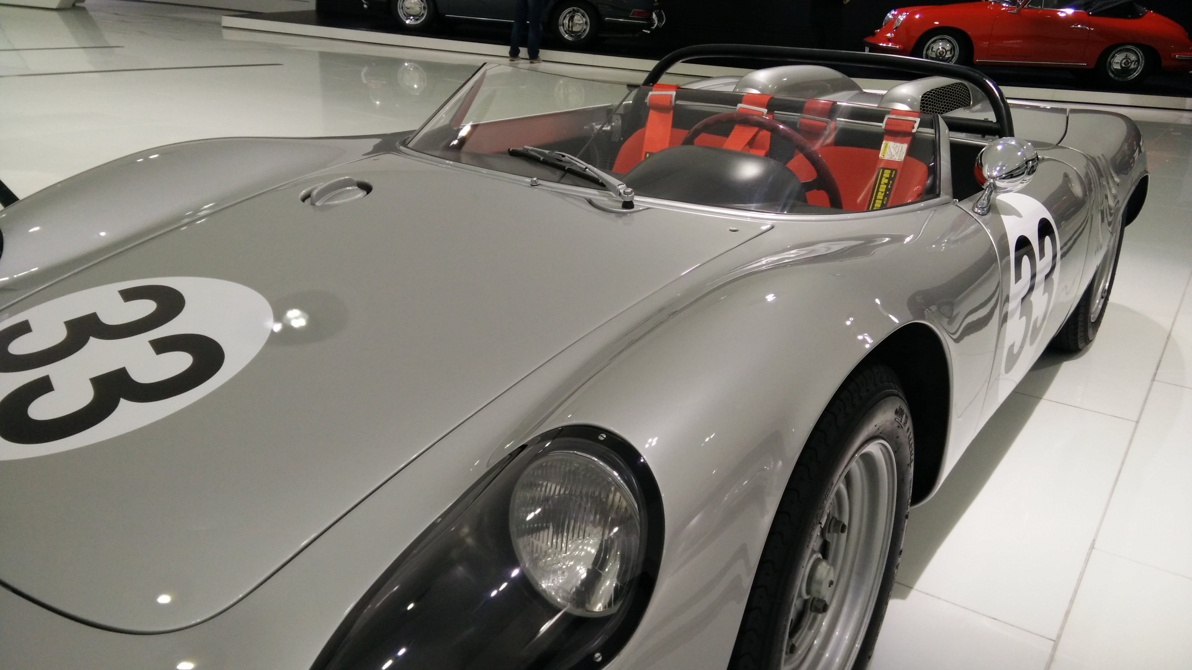 IMG_20141112_113831